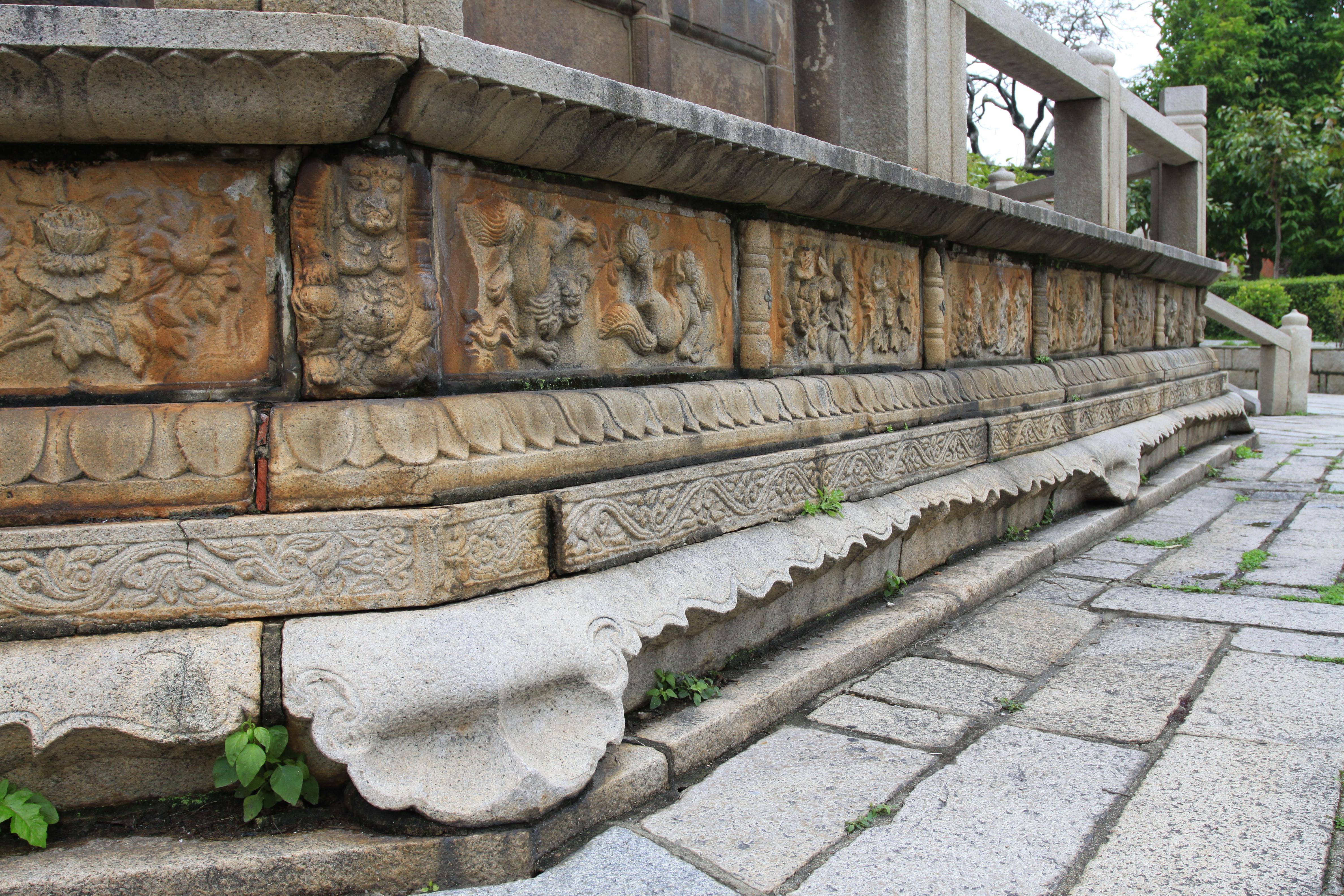 泉州开元寺西塔“仁寿塔”须弥座。